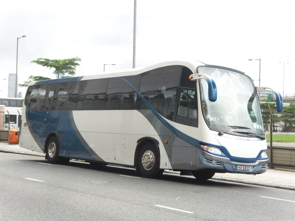 中文（香港）: 捷聯JL-010車身的五十鈴LV434R，2012年攝於北角渣華道